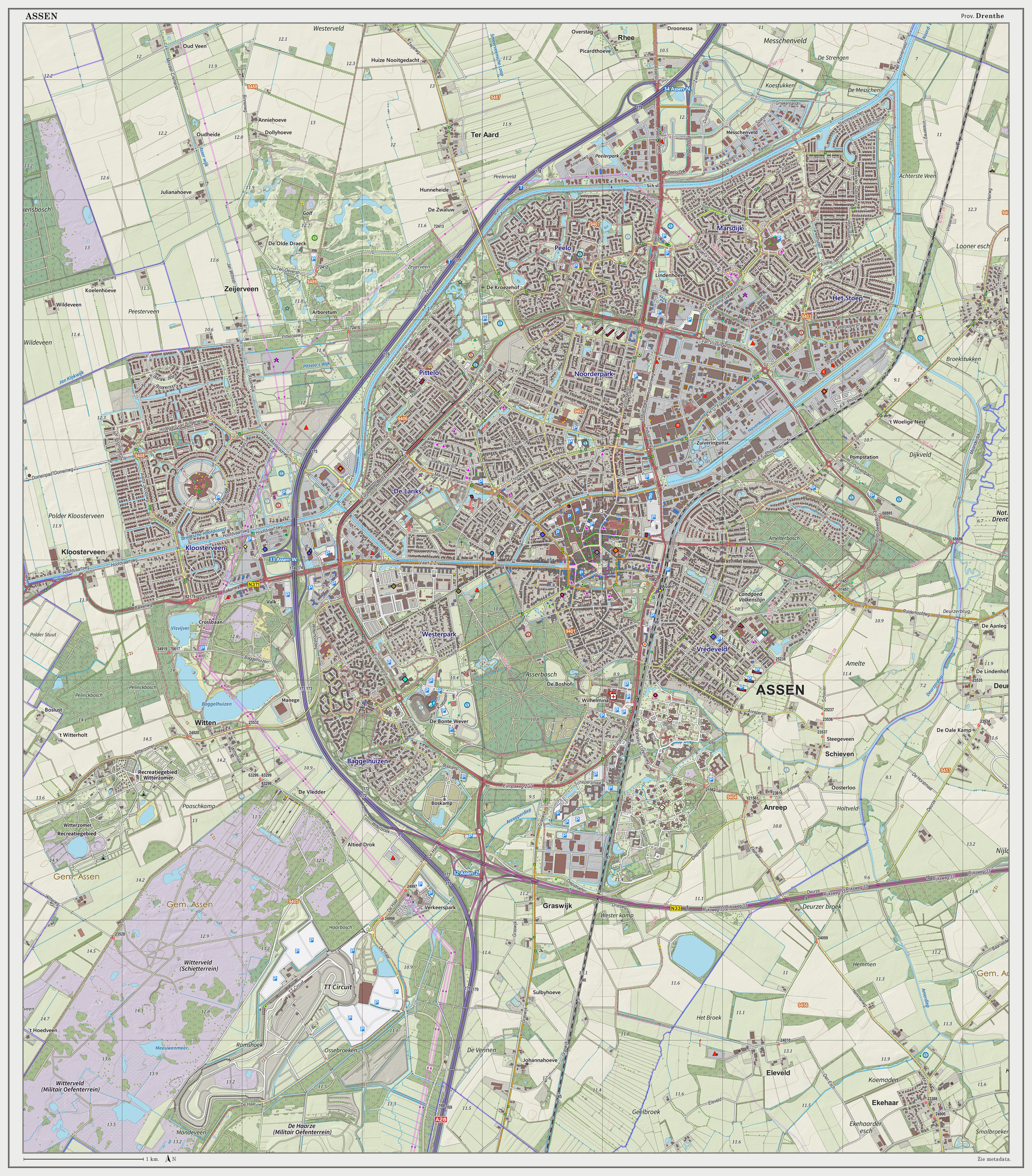 Topografische kaart van Assen (woonplaats). Resolutie: 300 pixels/km. Kaartbeeld samengesteld uit de open geodata van de Top10NL en Top25namen (Basisregistratie Topografie, Kadaster), Creative Commons BY licentie. Gebouwvlakken uit open geodata BAG extract. Wegen uit de OpenStreetMap. Reliëfschaduw uit de Actuele Hoogtekaart AHN2. Samenstelling en kleurenschema: Jan-Willem van Aalst, met QGIS2. Zie ook de Legenda.